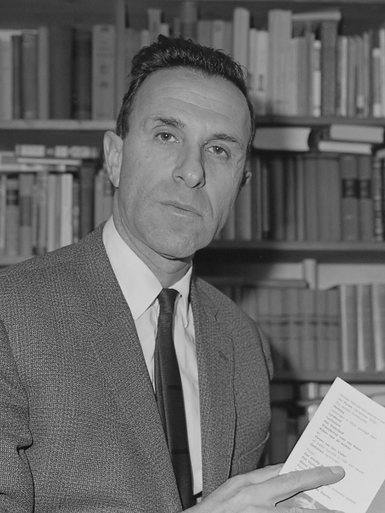 Henri Albert Gomperts (1963) 13 december 1963